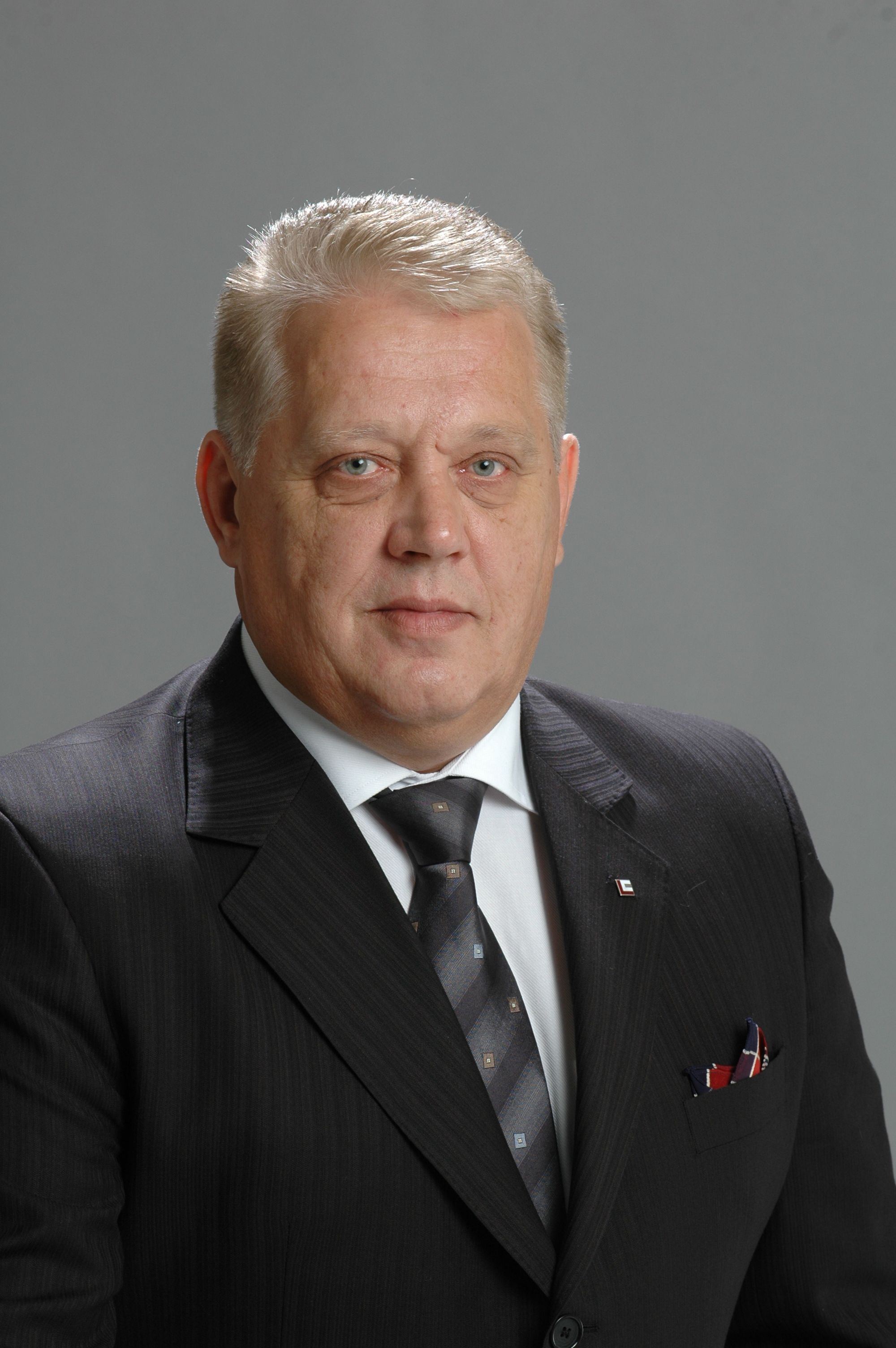 Foto: Saeima